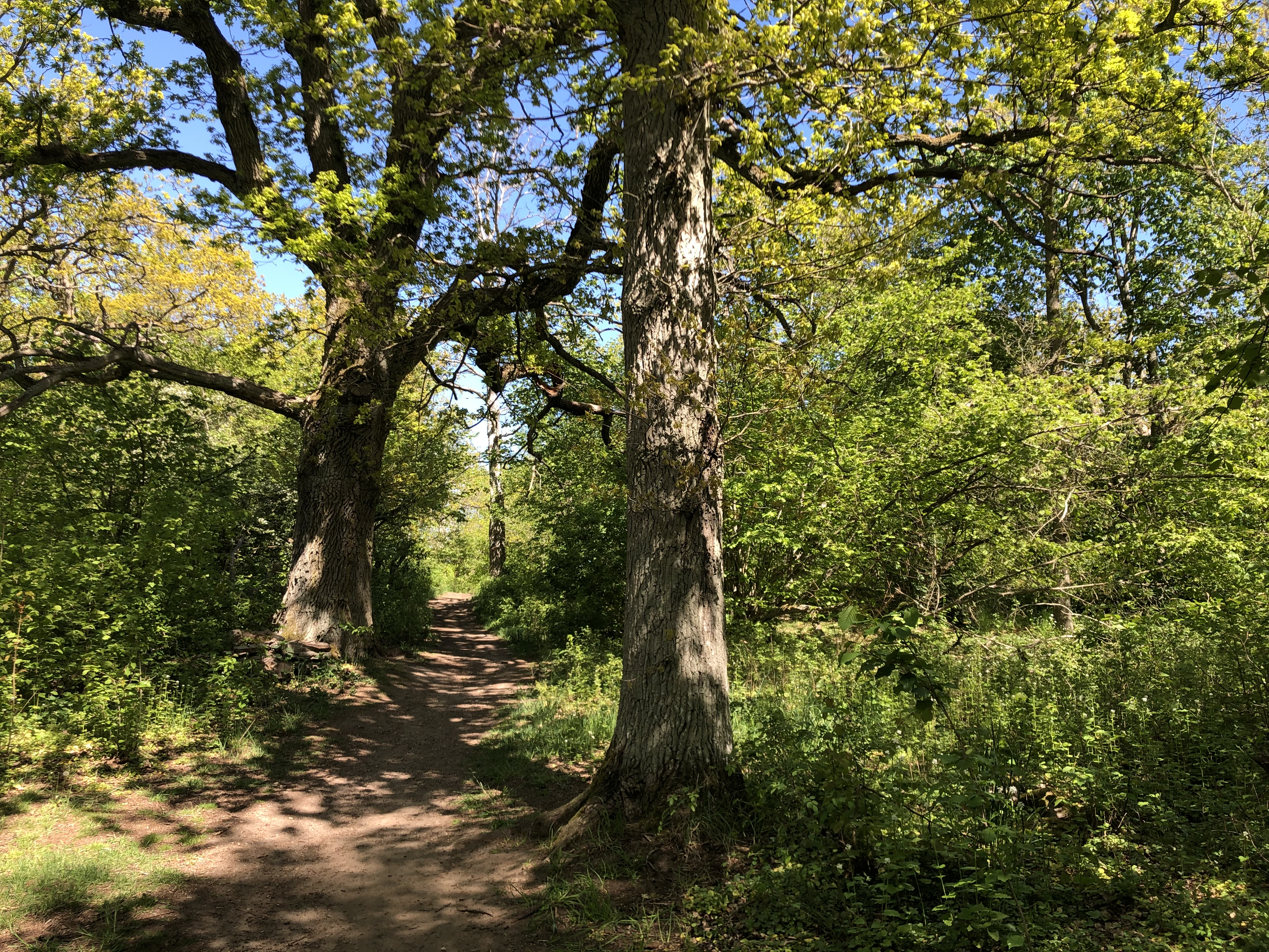 Djurängshagen är ett naturområde i Kalmar med höga naturvärden, dominerat av ek och hassel